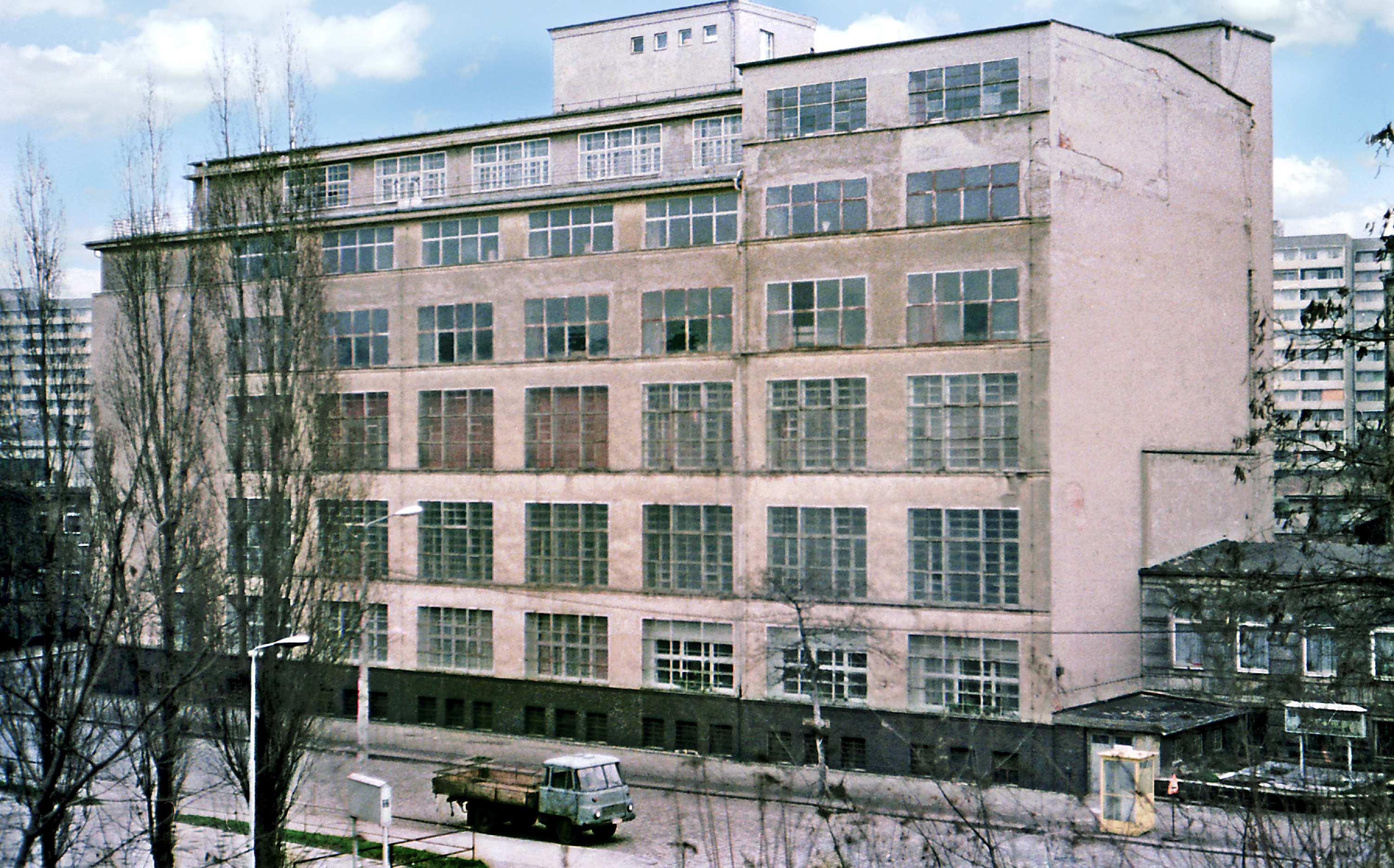 01.04.1988 Dresden-Südvorstadt West / -Plauen: Industriebau Zwickauer Straße 35 (GMP: 51.038581,13.714617), ursprünglich Zigarettenfabrik Greiling. Als modernes Büro-, Verwaltungsund Produktionsgebäude nach Plänen des Architekten Max Krautschick 1926/27 im Stil des Neuen Bauens (Bauhausstil) errichtet. 1970 wurde in diesem Werk die Zigarettenproduktion eingestellt, das Gebäude diente nur noch als Importlager. Sicht von der Zwickauer Straße. 1998 abgebrochen. [F19880215A44.JPG]19880401020DR.JPG(c)Blobelt